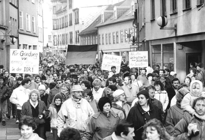 Ilmenau, Demonstration ADN-ZB Schaar 10.12.89 Suhl: Zu einer Demonstration hatte das Neue Forum anläßlich des Tages der Menschenrechte aufgerufen. 15.000 Bürger von Ilmenau folgten dem Aufruf zu einem Marsch durch die Innenstadt. Information added by Wikimedia users.Auf der Straße des Friedens, Blick Richtung Marktstraße (Michael Sander).